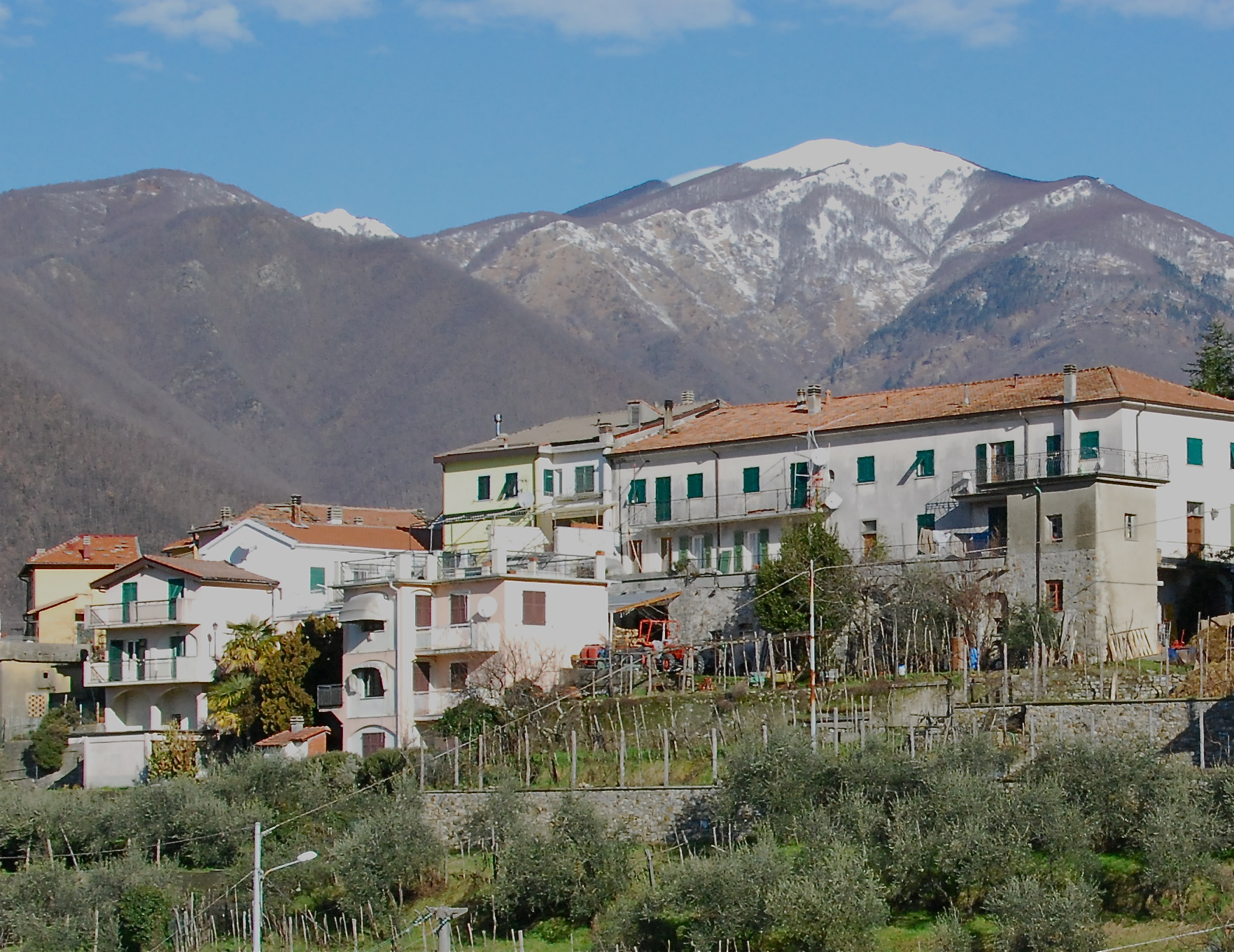 Panorama